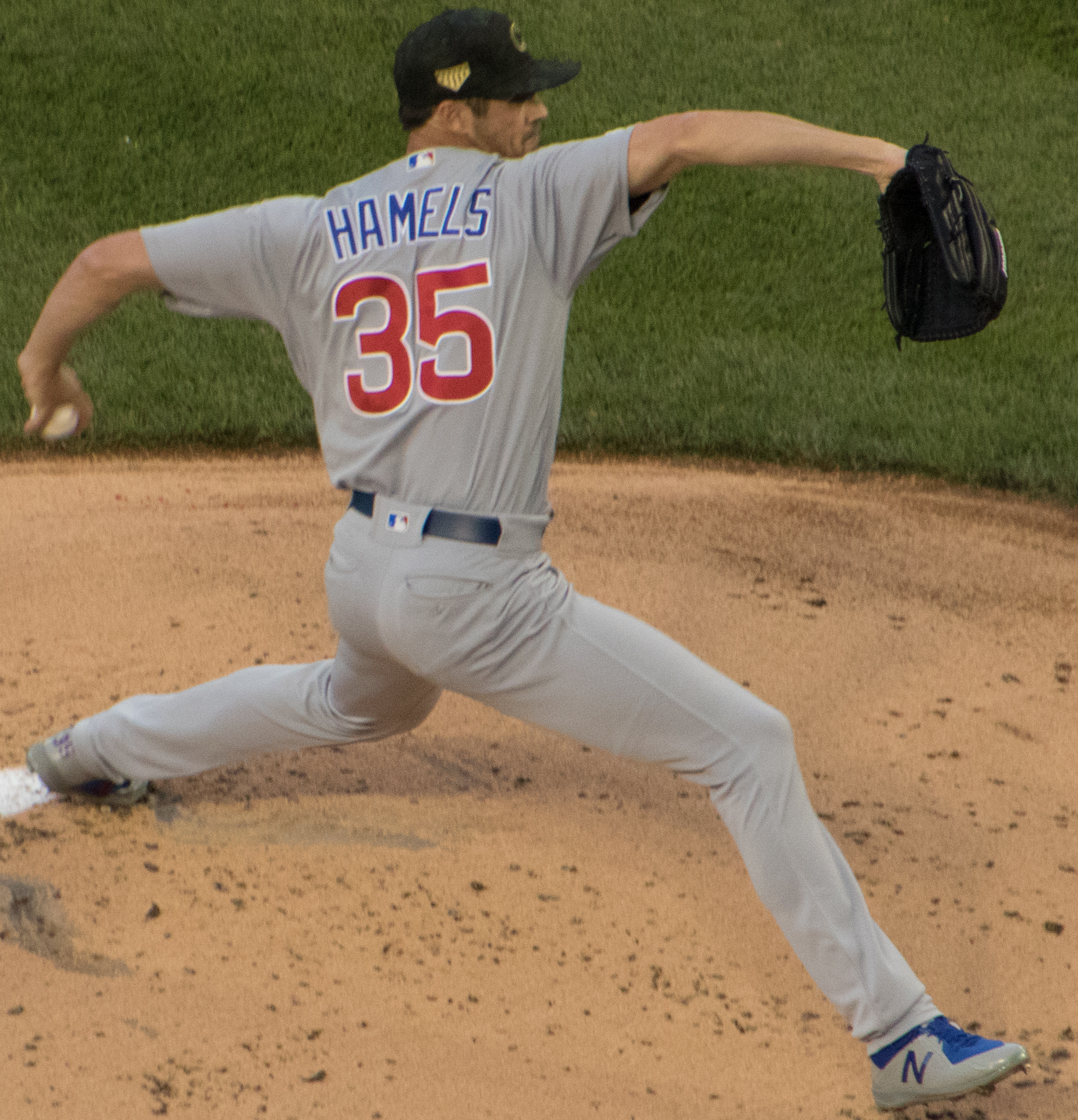 Cole Hamels